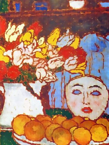 A kép Rippl-Rónai József: maszkos Csendélet című képét ábrázolja. A kép készítési ideje 1910. (közkincs) A festmény a győri Városi Művészeti Múzeum tulajdona. A múzeum kiadványairól való másolást a múzeum igazgatója engedélyezte.